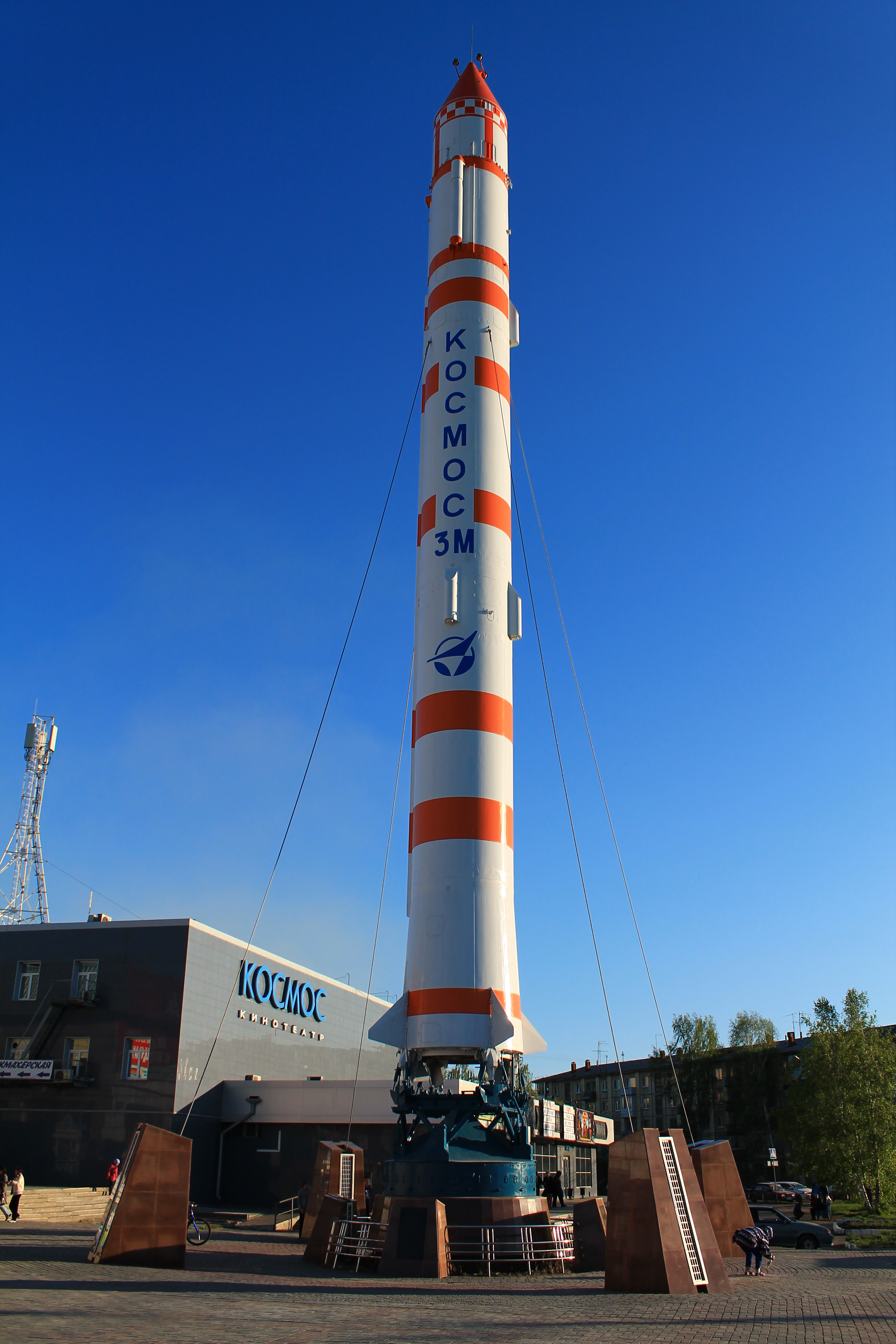 Ракета-носитель Космос 3М на площади перед кинотеатром Космос на Космическом проспекте в городе Омске